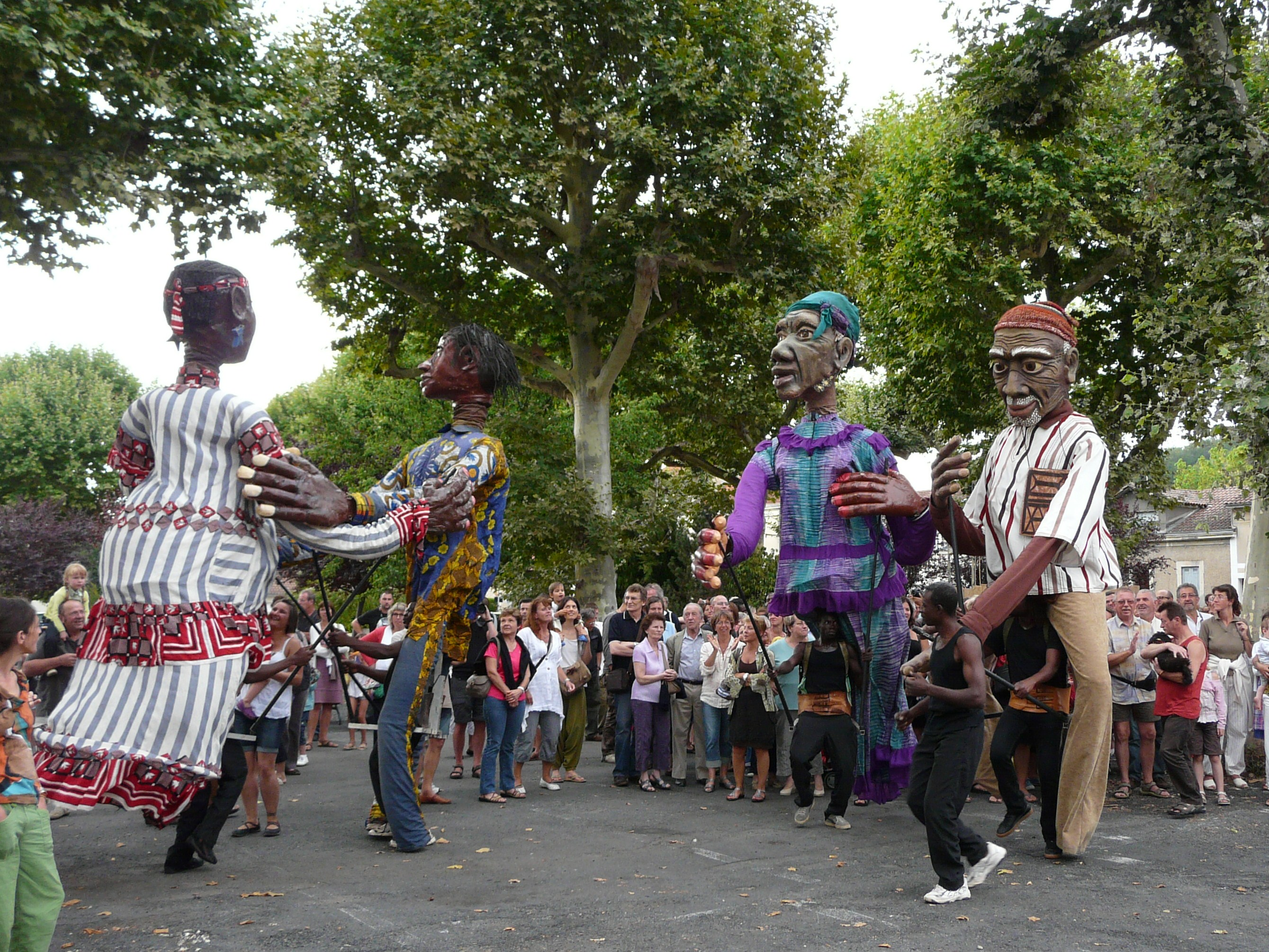 Originaires du Burkina Faso, les Grandes personnes de Boromo lors du festival Mimos à Périgueux, Dordogne, France.